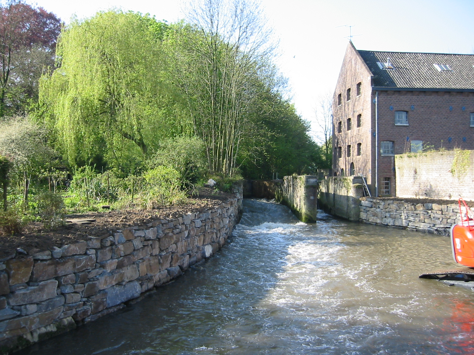 Eigen foto. GerardM 25 apr 2004 08:30 (CEST) Een watermolen tusse Kanne en Maastricht. De Jeker mag na het passeren van twee huizen vrij gaan stromen.